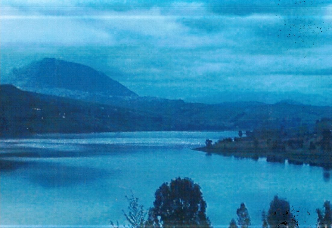 Lago Poma originato dalla diga sul Fiume Jato che fu fortemente voluta da Danilo Dolci, riserva idrica di Palermo e dei paesi della costa ovest palermitana